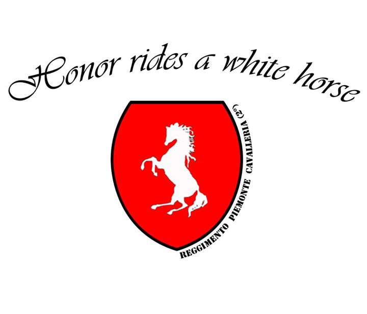 Il Cavallino Rampante di Piemonte Cavalleria nella versione progettata e realizzata nel 2015 dai Cavalieri in forza al Reggimento